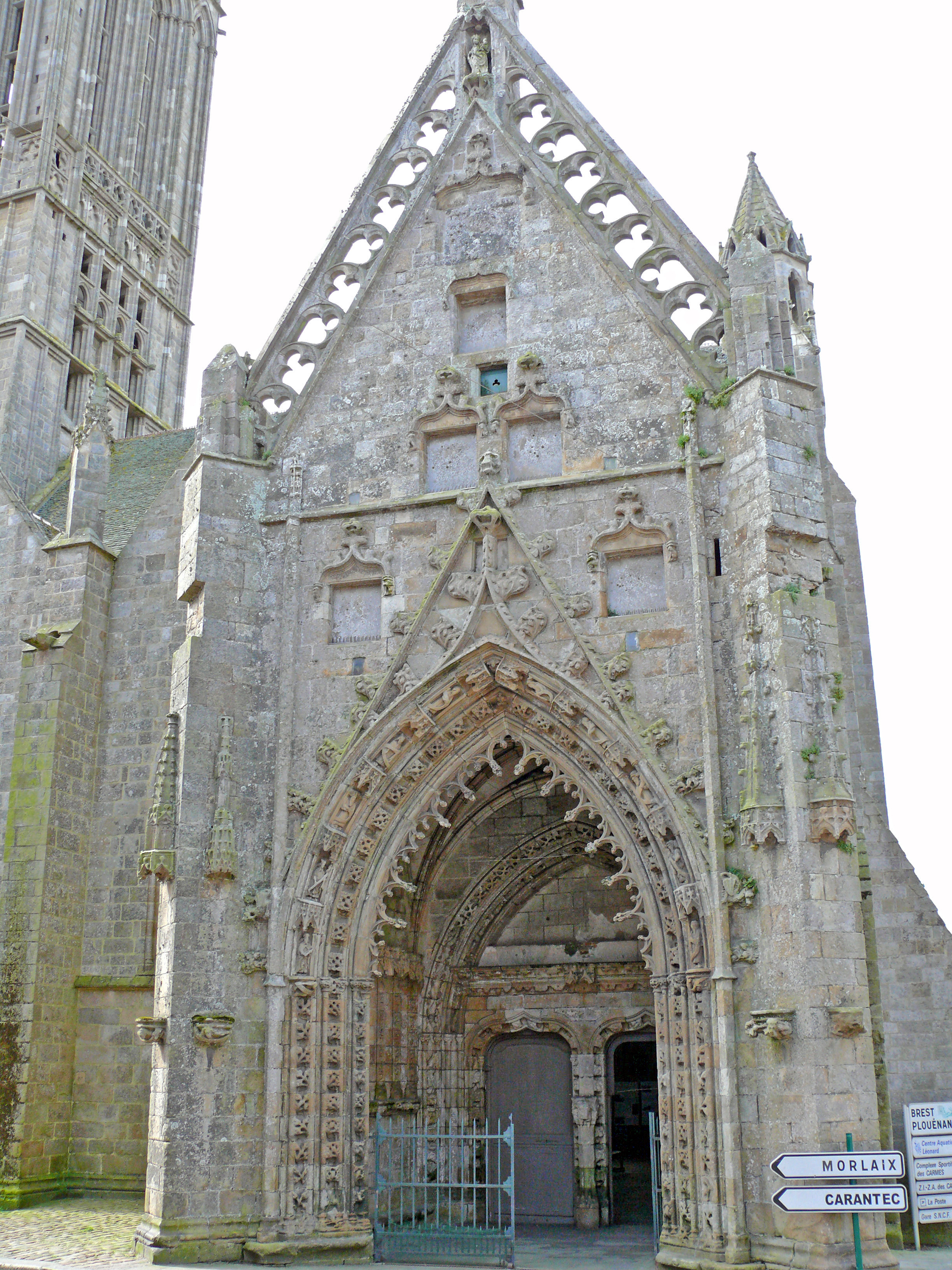 Saint-Pol-de-Léon - Notre-Dame du Kreisker - Portail